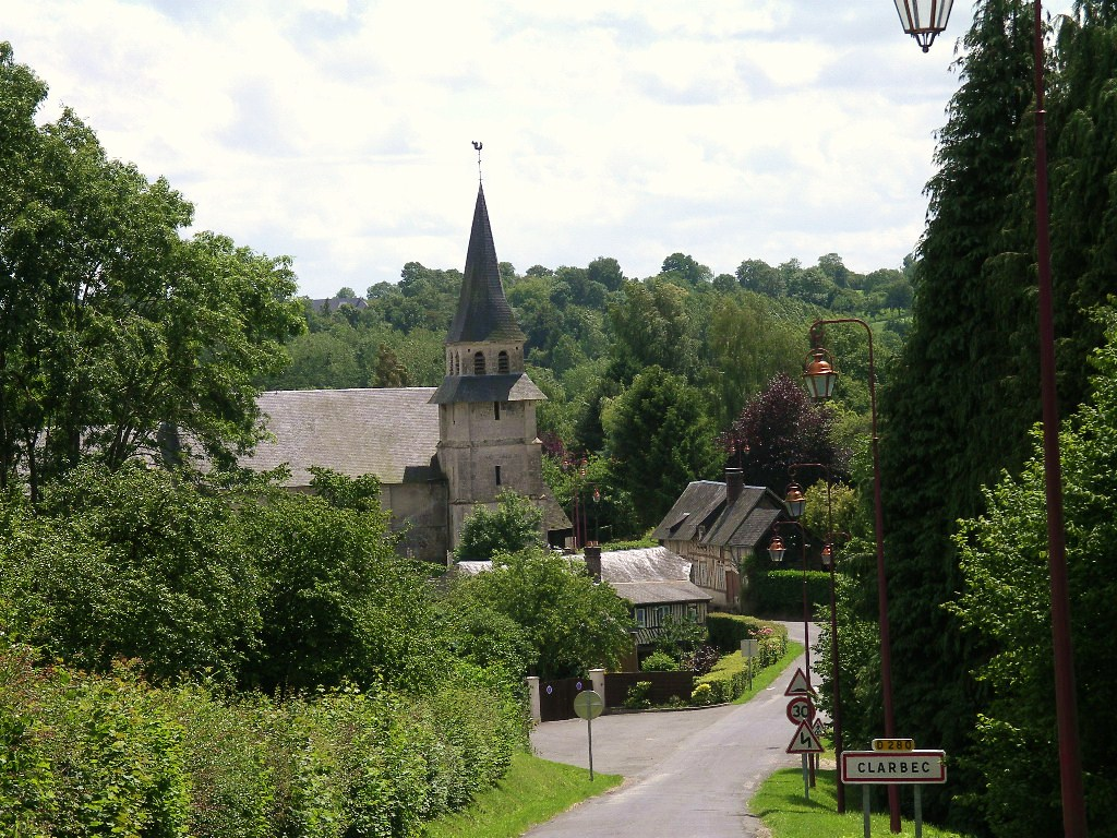 Village de Clarbec (Calvados)